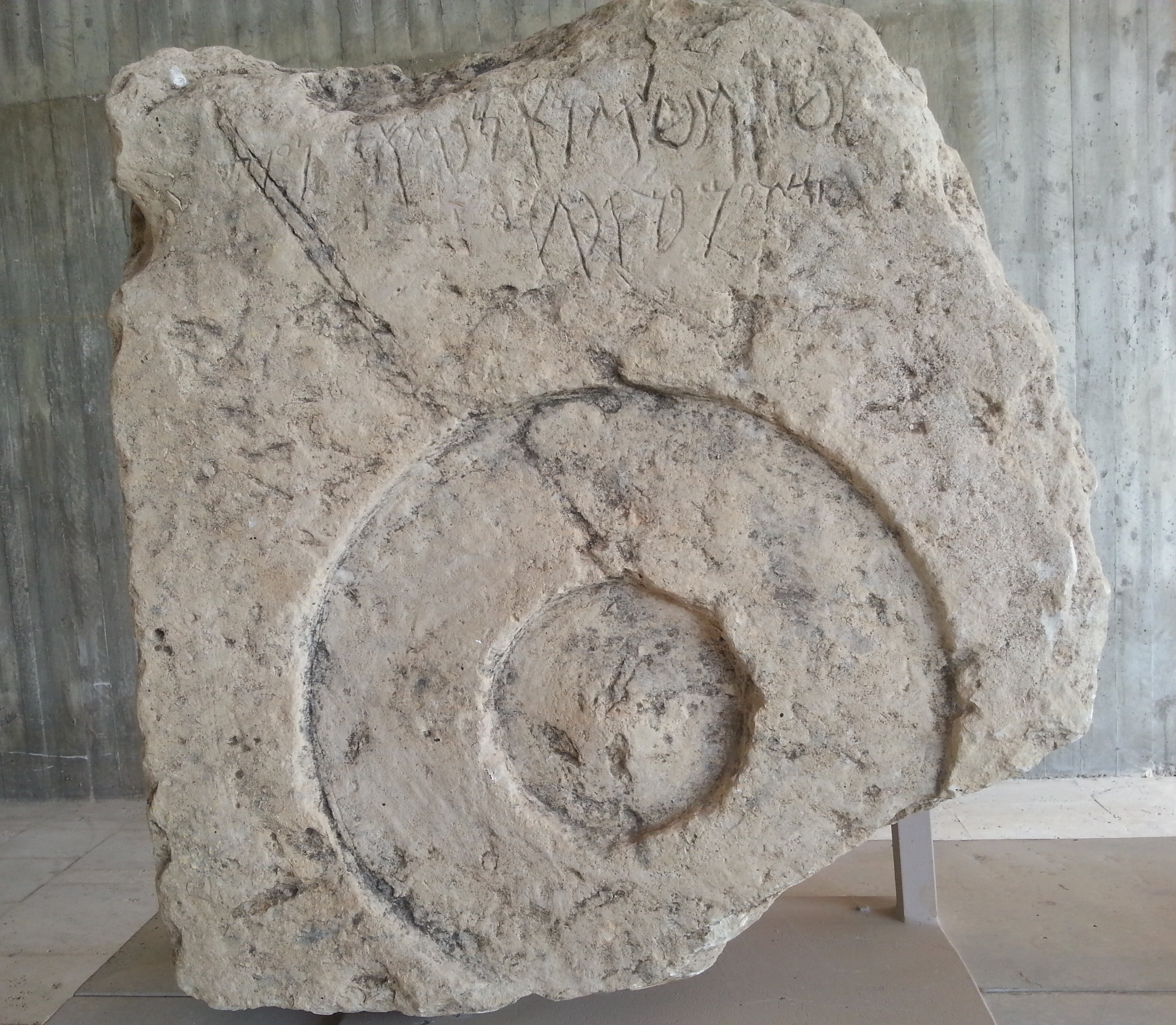 Inscripción púnica descubierta en superficie en el sector del túmulo de Volubilis. Finales del siglo II a. C. Estela funeraria que lleva un motivo identificado como un escudo. No subsiste de la inscripción más dos líneasː «estela que ha dedicado [...] hijo de [...] el sufete que murió en una vejez feliz a la edad de 90 años. Es originario de QFGWD».